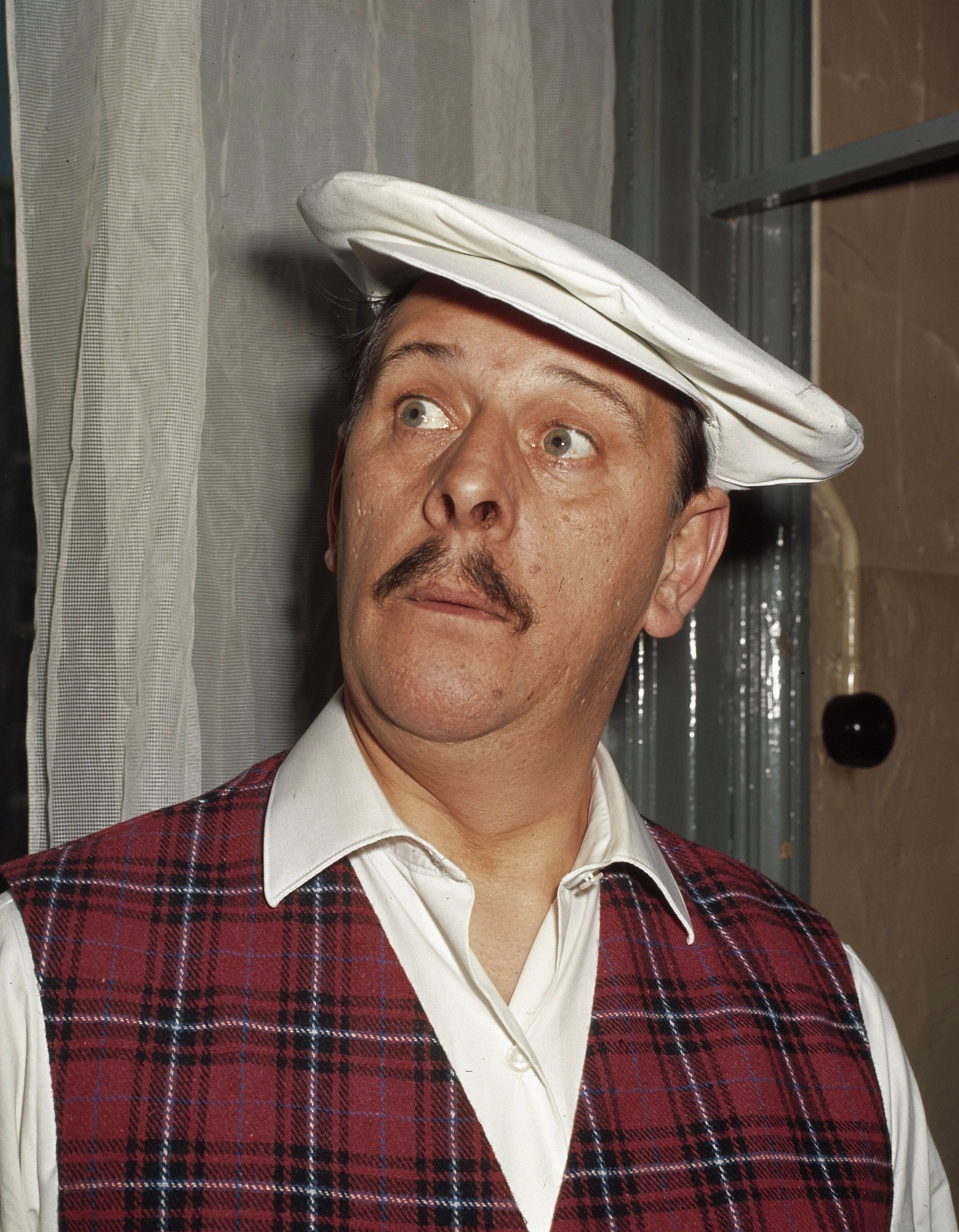 Joop Doderer in No no Nanette